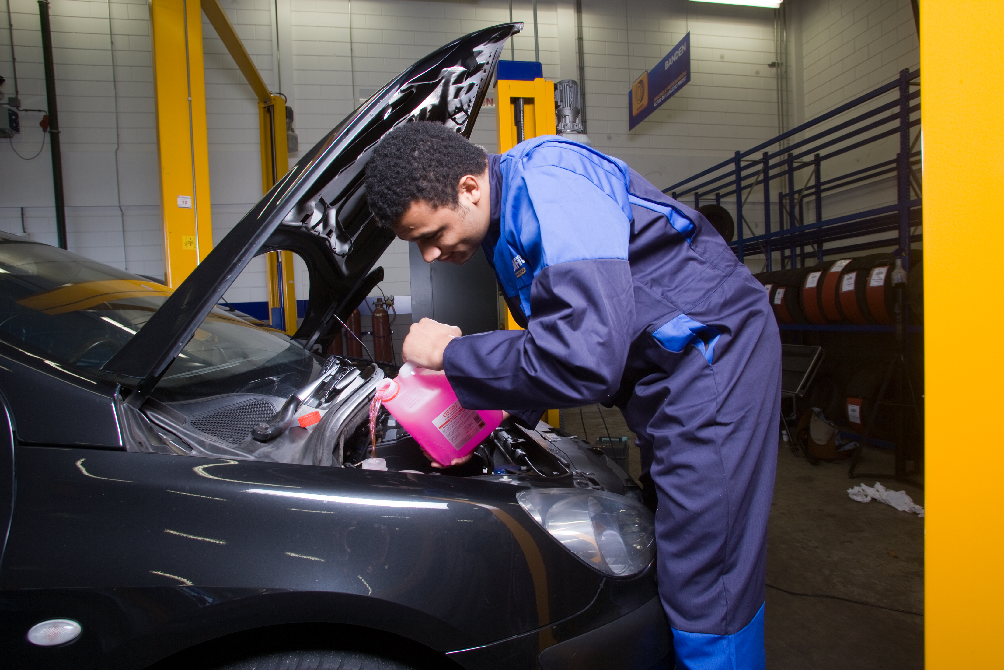 Kleine en Grote onderhoudsbeurt